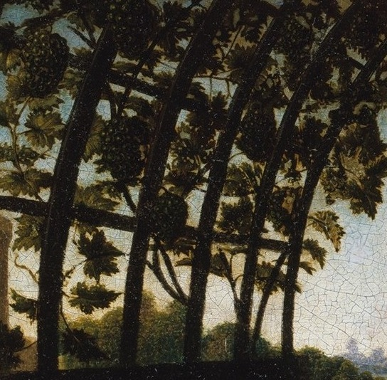 detail: grape arbor